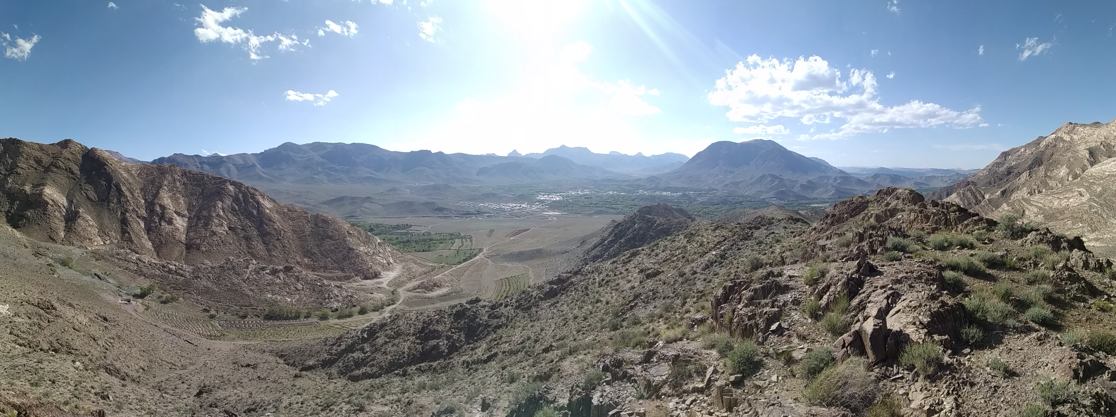 mazayejan panomora